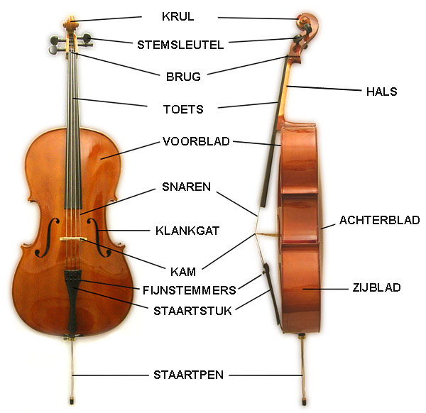 Cello, belangrijkste onderdelen in het Nederlands Nederlandse versie: Ed Stevenhagen. Foto Duitse versie afkomstig van Wikipedia Commons: "Cello Uebersicht Teile.jpg" * fotograaf: Georg Feitscher * datum deze bewerking 29 Juli 2005 * licentie: GNU FDL